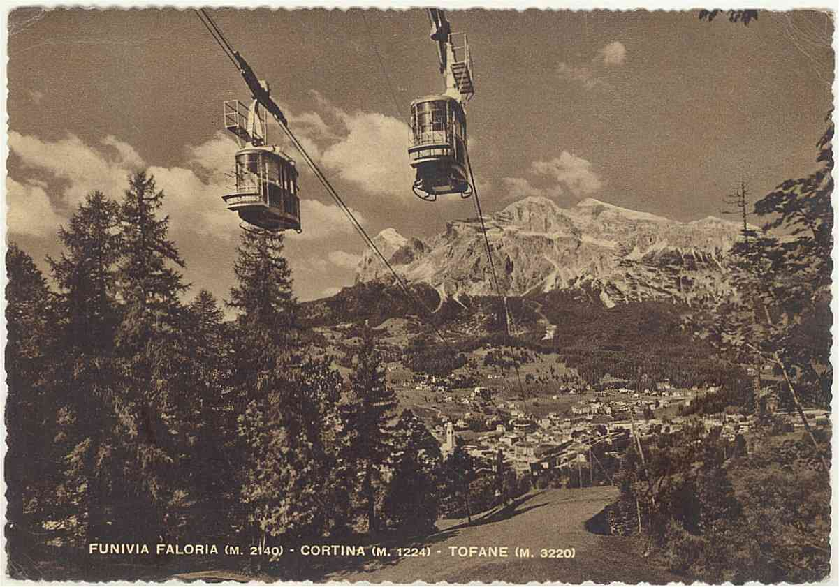 BL Cortina (m.1224) - funivia Faloria (m.2140) - Tofane (m.3220)